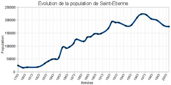 Population de Saint-Etienne (1793-2007).